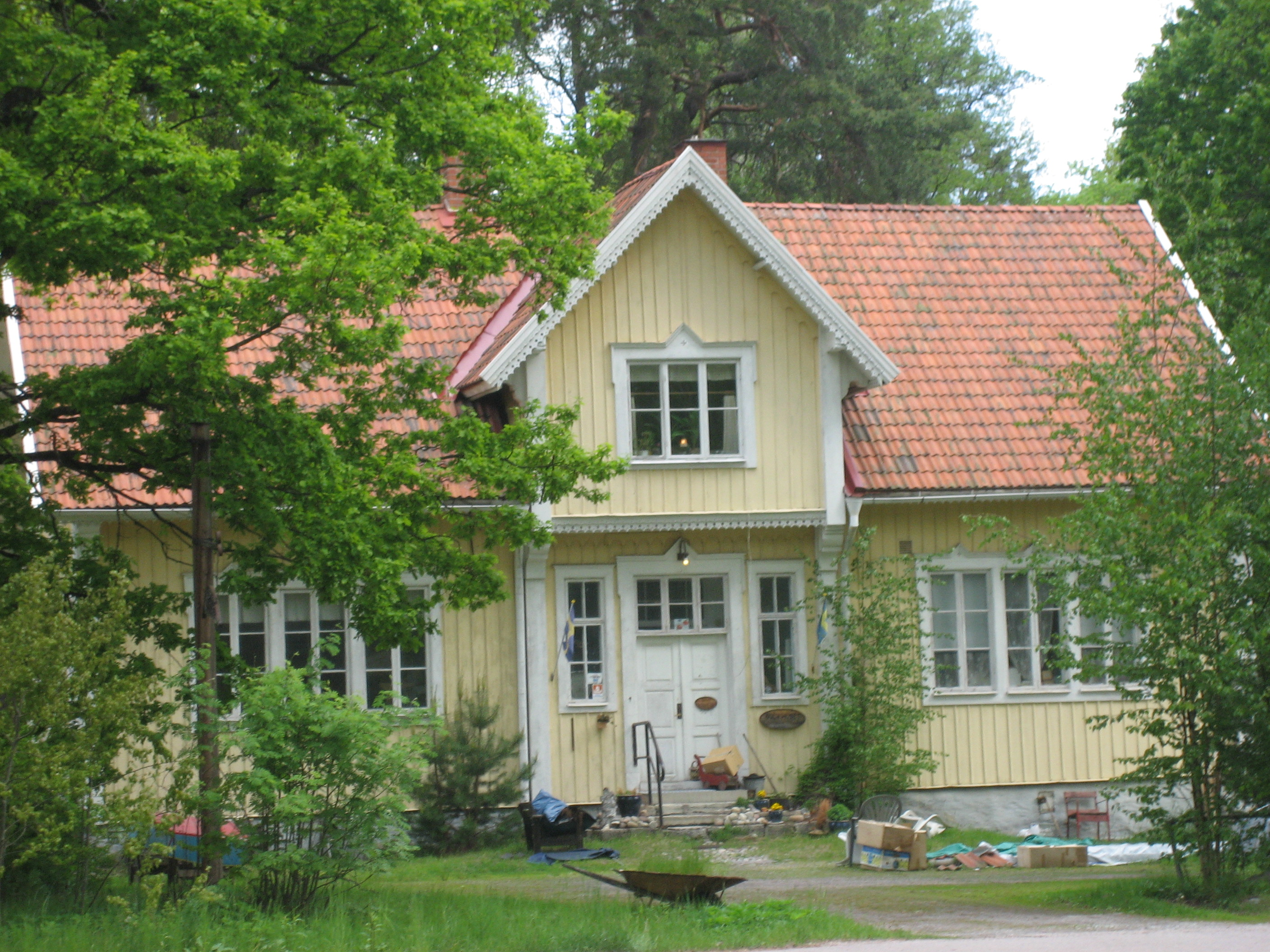 Gula Väven, Örebro, Sweden